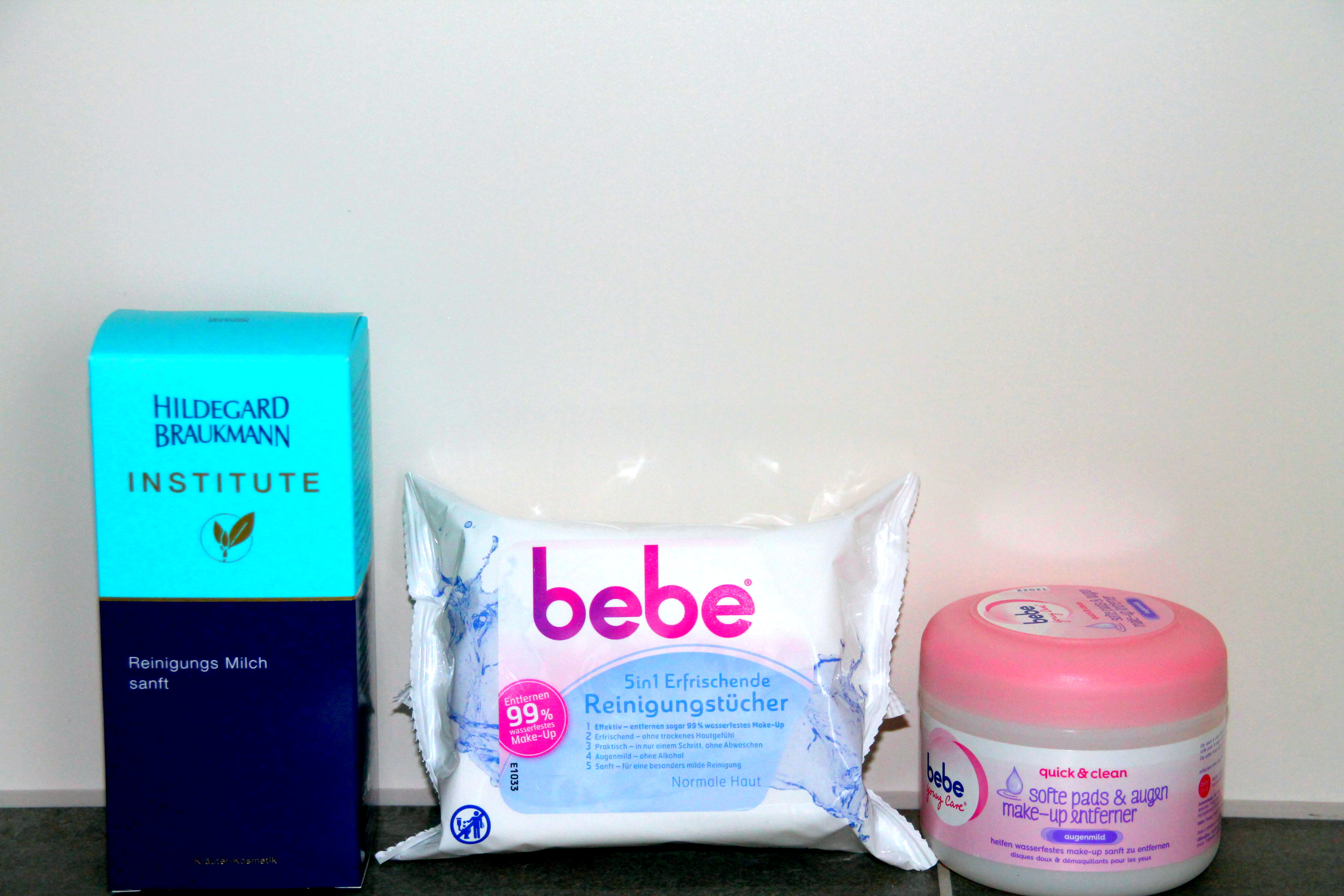 Ölbasierende Hautreinigungsmittel